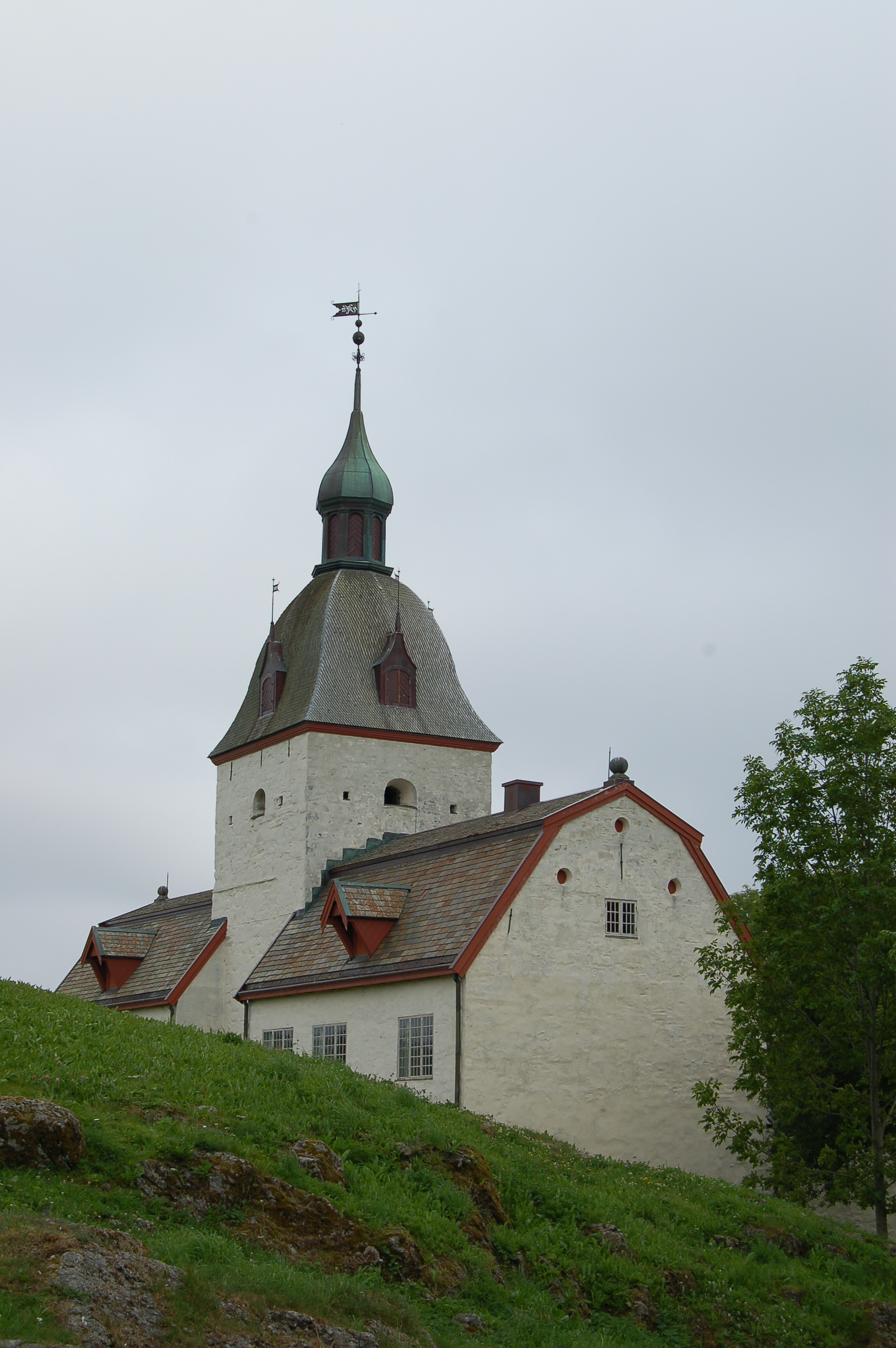 Austråttborgen